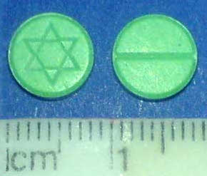 beschlagnahmte m-CPP-Tabletten (Kripo)